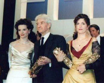 Juliette Binoche, Alain Resnais et Agnès Jaoui à la 23e cérémonie des César